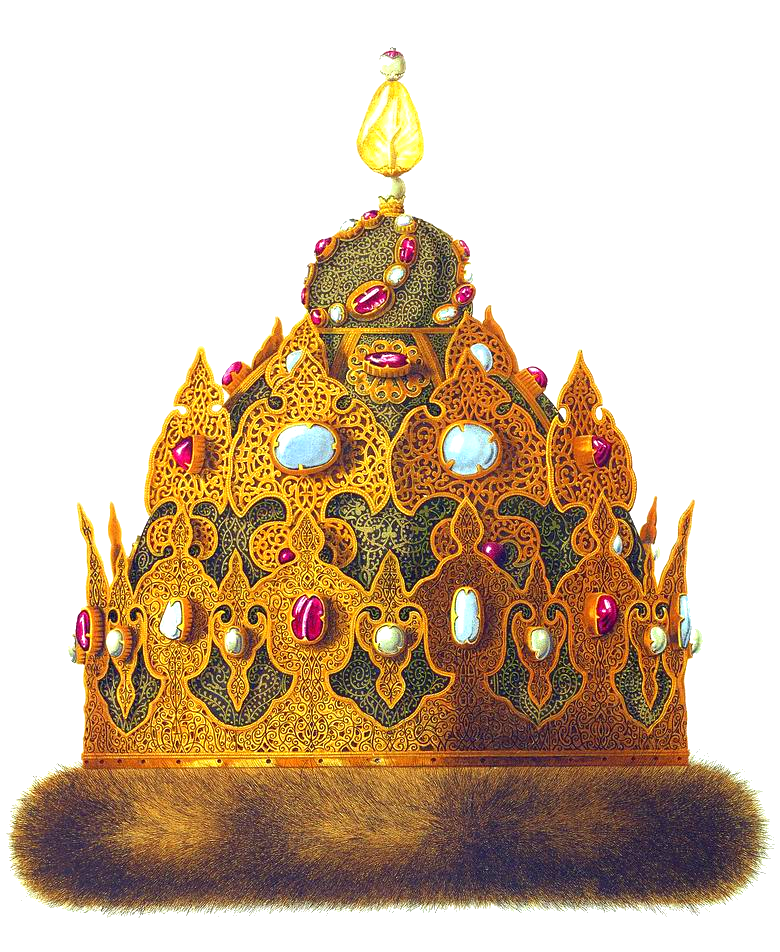 Kazan crown